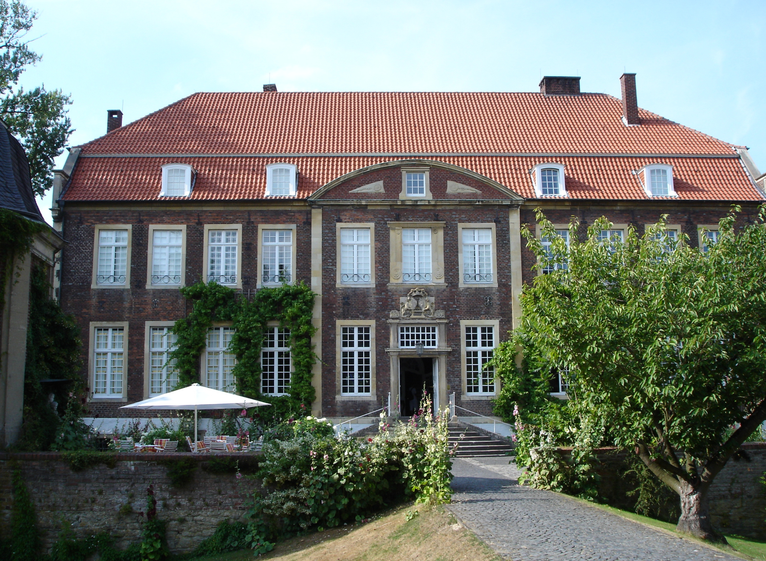 Schloss Wilkinghege in Münster, Westphalia, Germany